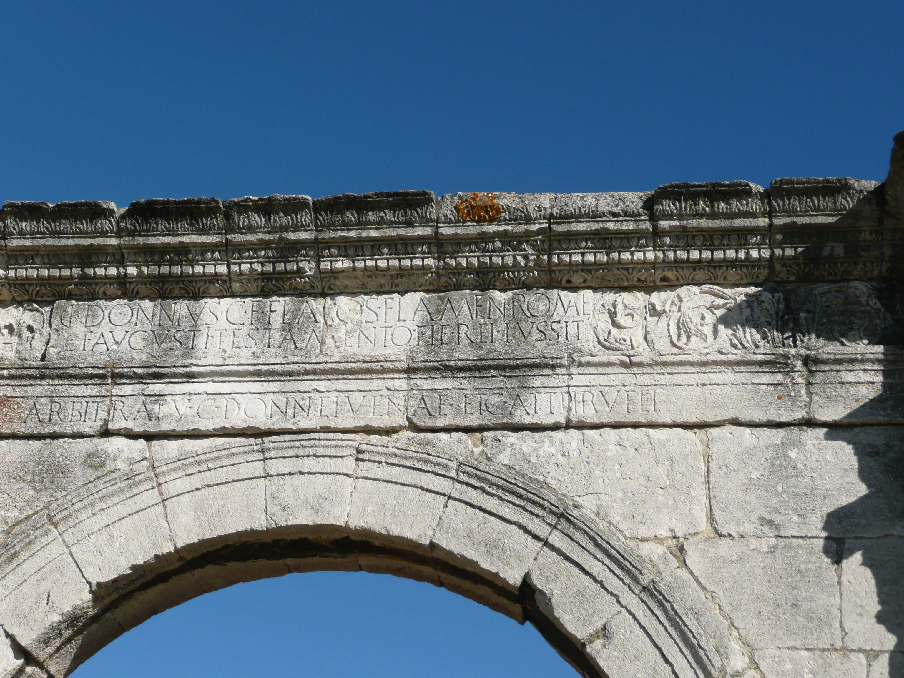 Pont Flavien. Inscription latine sur le pont. Référence CIL XII, 647.